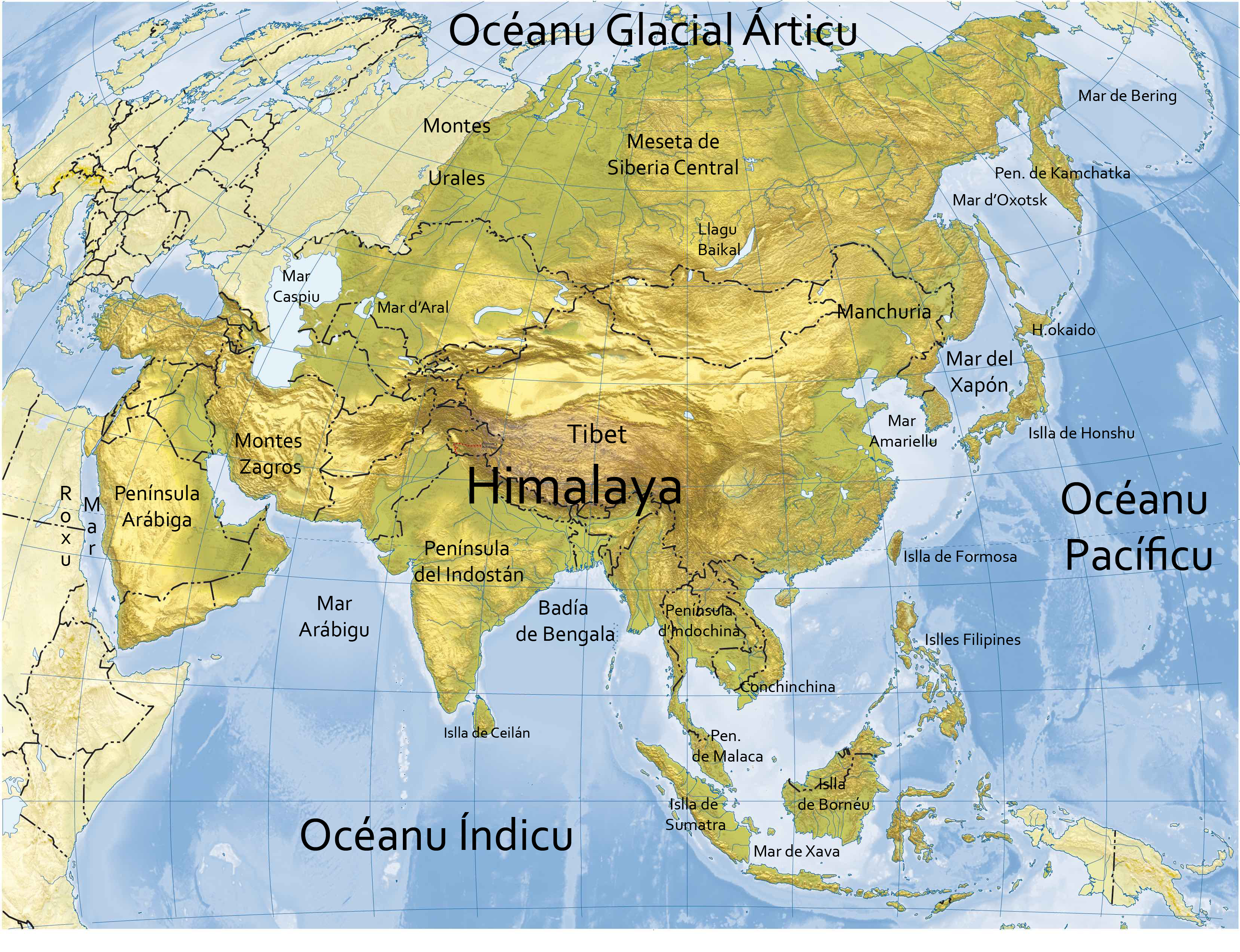 Asia. Xeografía física.